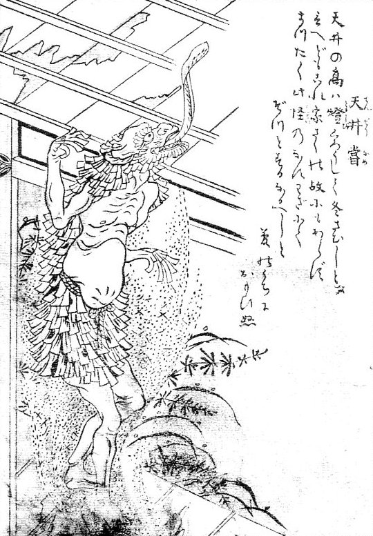 Tenjo_name (天井嘗) from the Gazu Hyakki Tsurezure Bukuro (百器徒然袋)